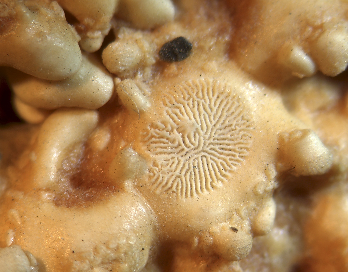 Placa madrepórica; probablemente Asterias sp.